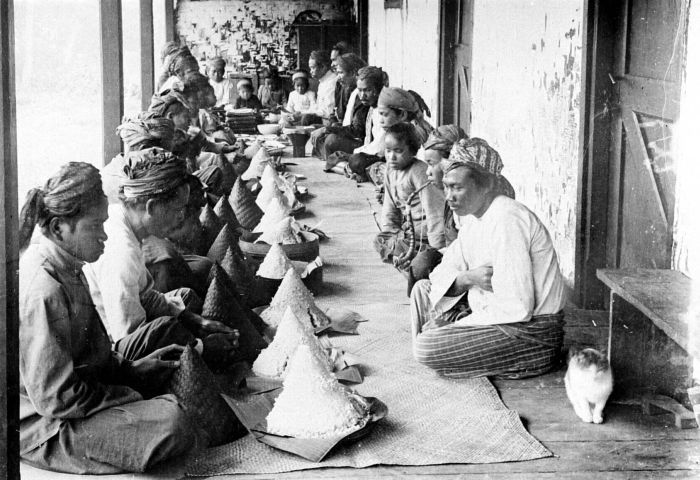 Repronegatief. Een religieuze maaltijd "selamatan" in Tjibodas